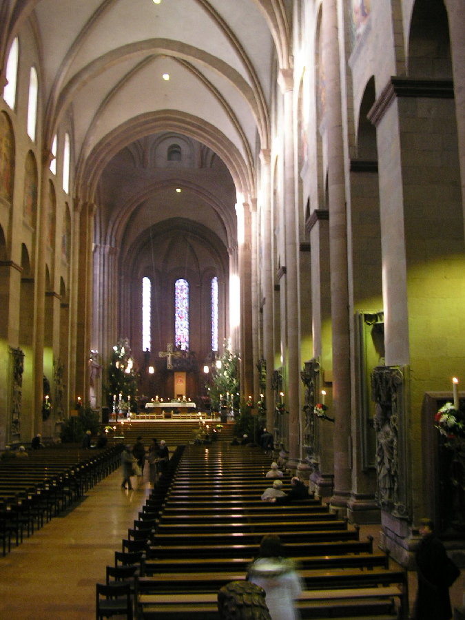 Inside Mainz Cathedral Description in de Wikipedia Bildmotiv: Hauptschiff des Mainzer Doms nach Westen; Quelle: eigene Fotografie vom 06.01.05; Lizenz: GNU-FDL